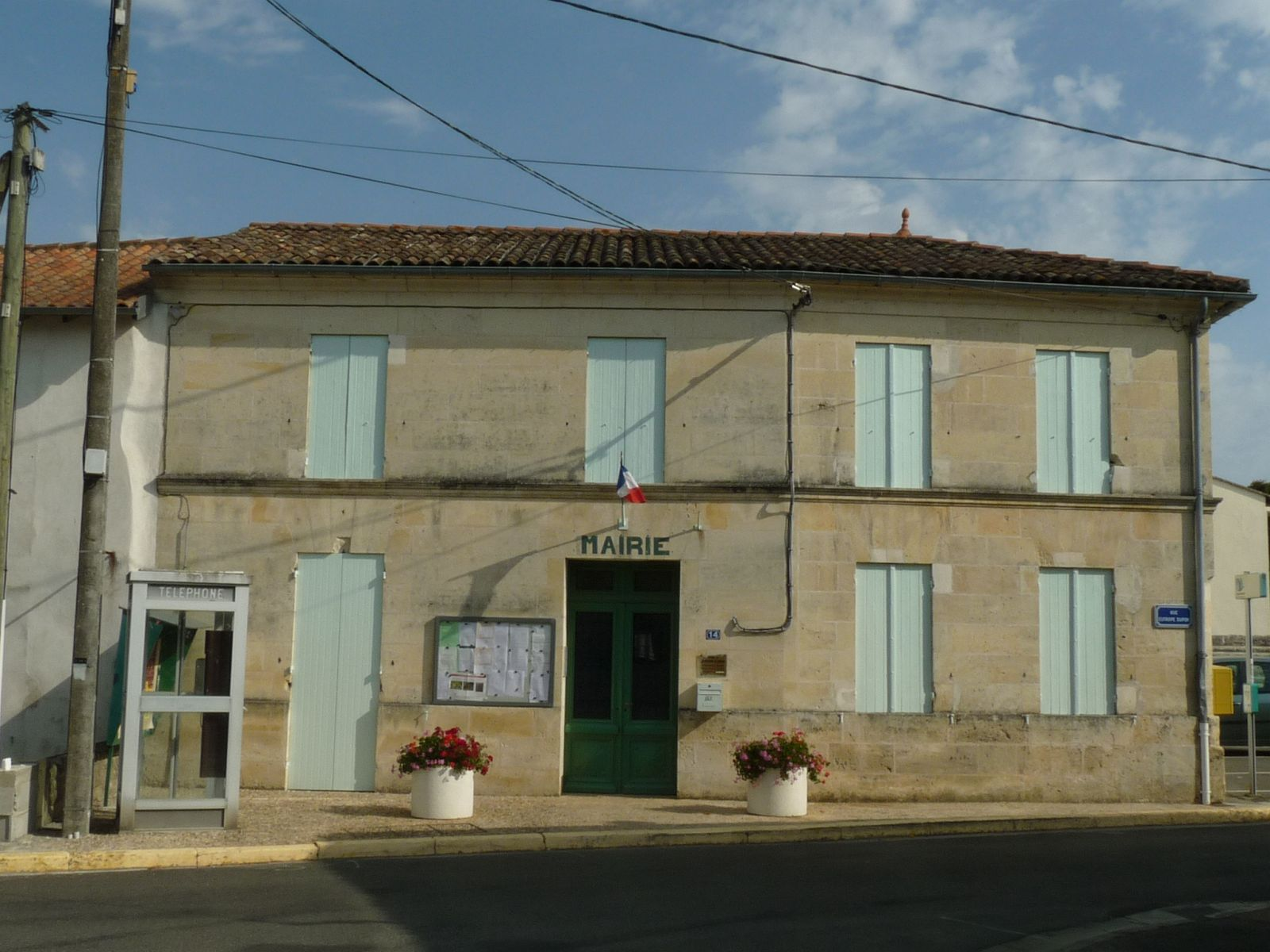 mairie de St-Germain-du-Seudre (17), France